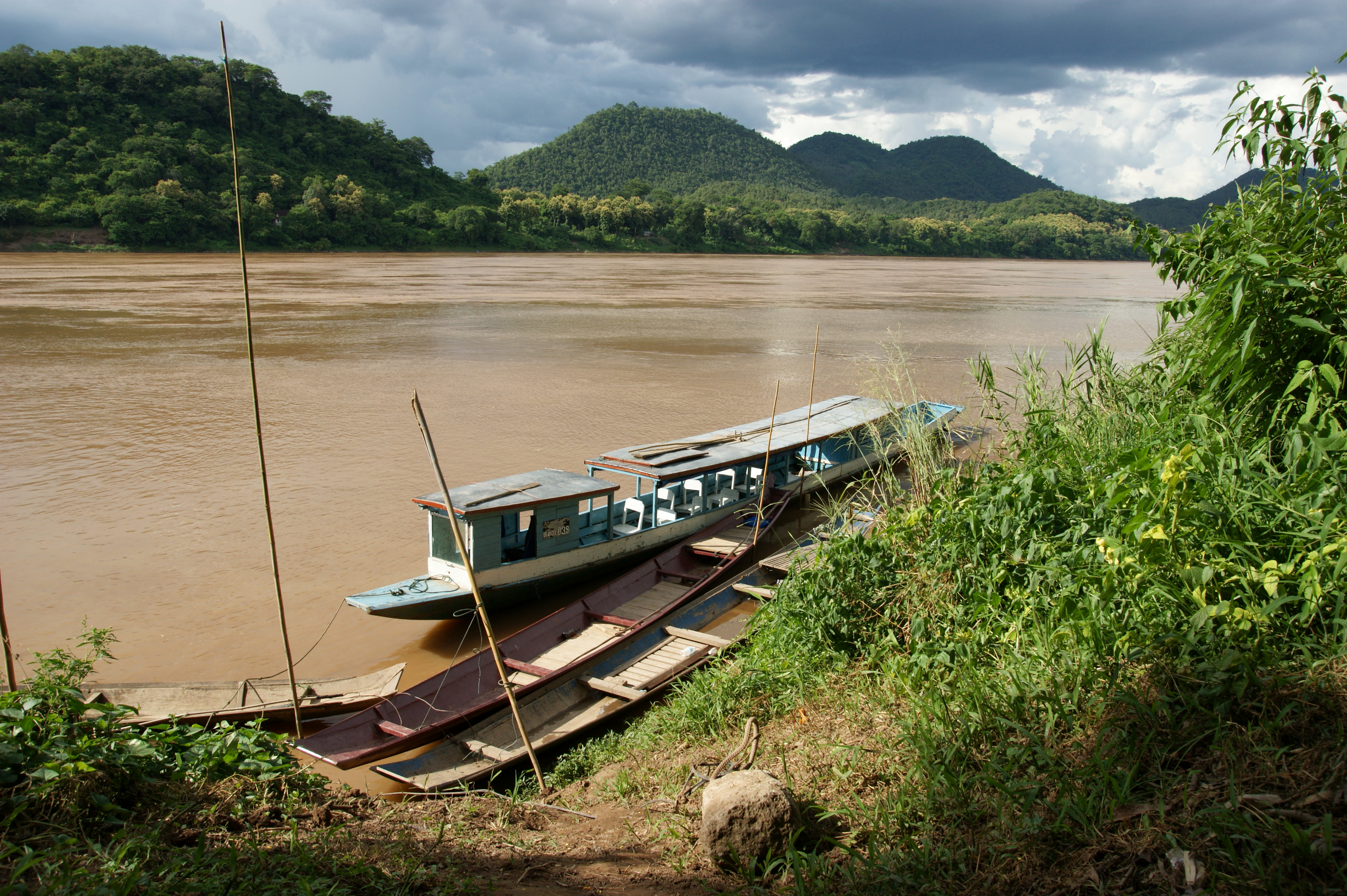 Mekong barge